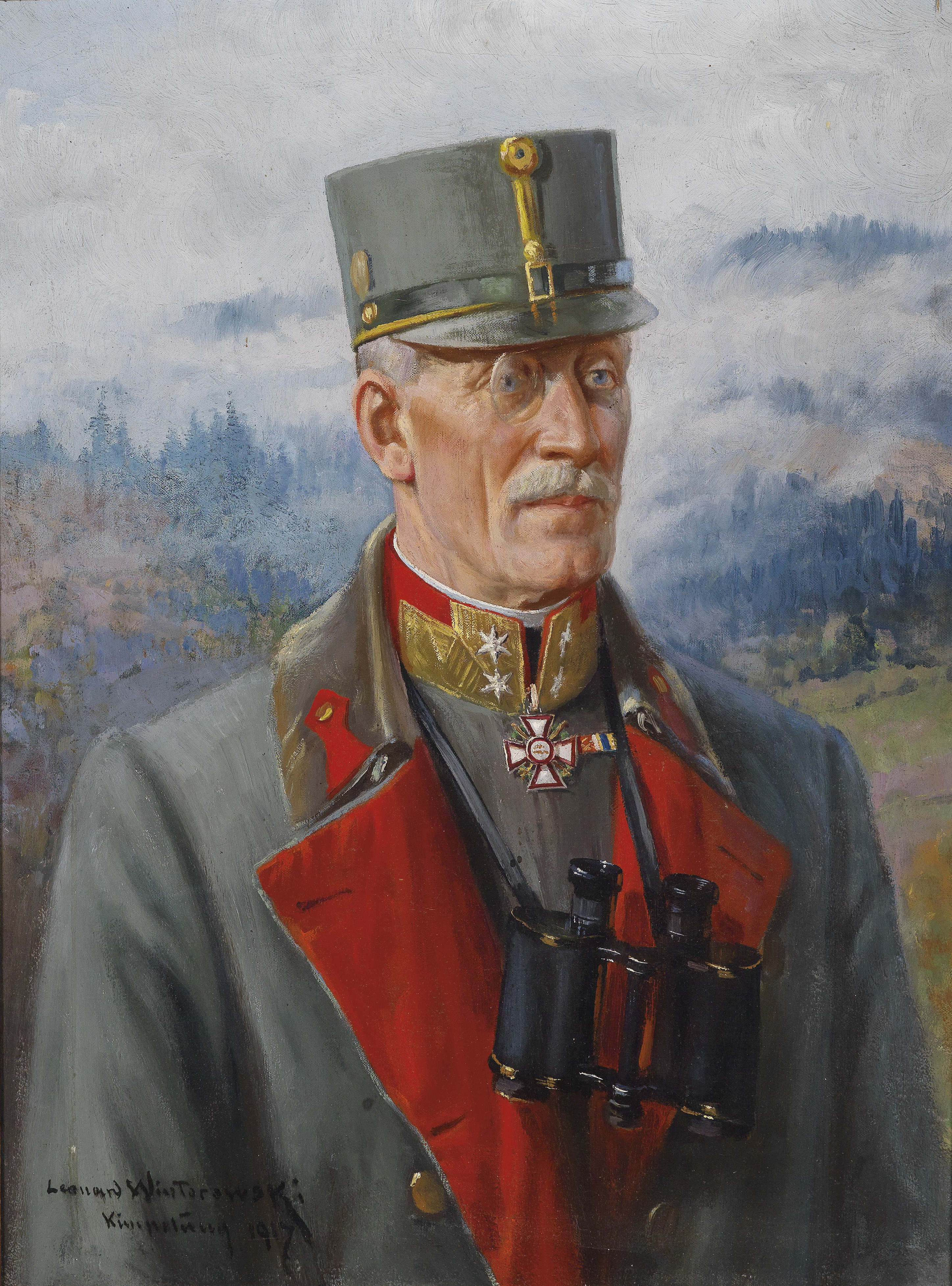 Feldmarschalleutnant Heribert Graf Herberstein (1863-1940), signiert und datiert "Leonard Wintorowski 1917"